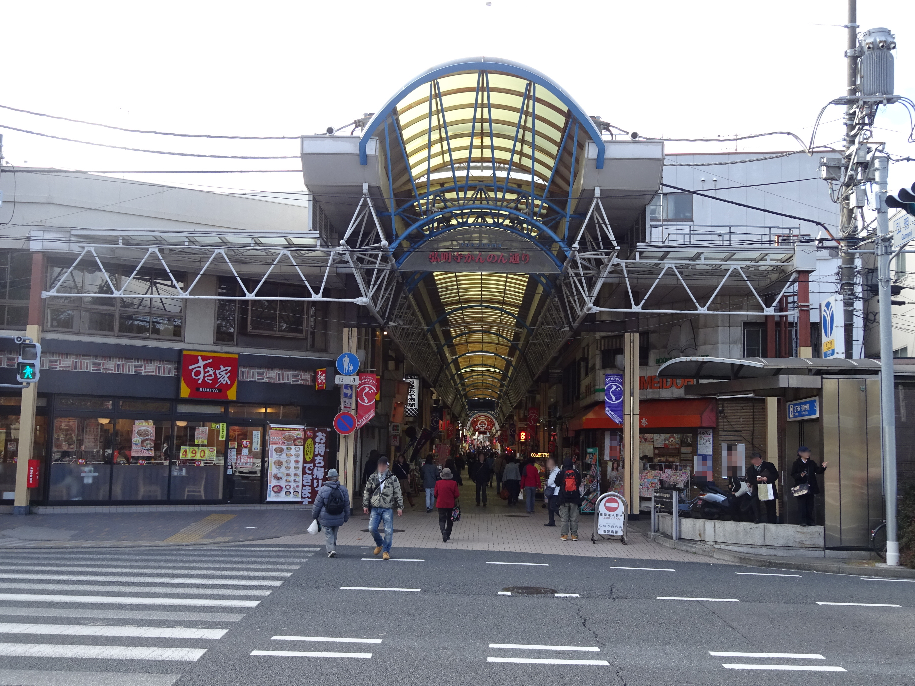 弘明寺かんのん通り商店街